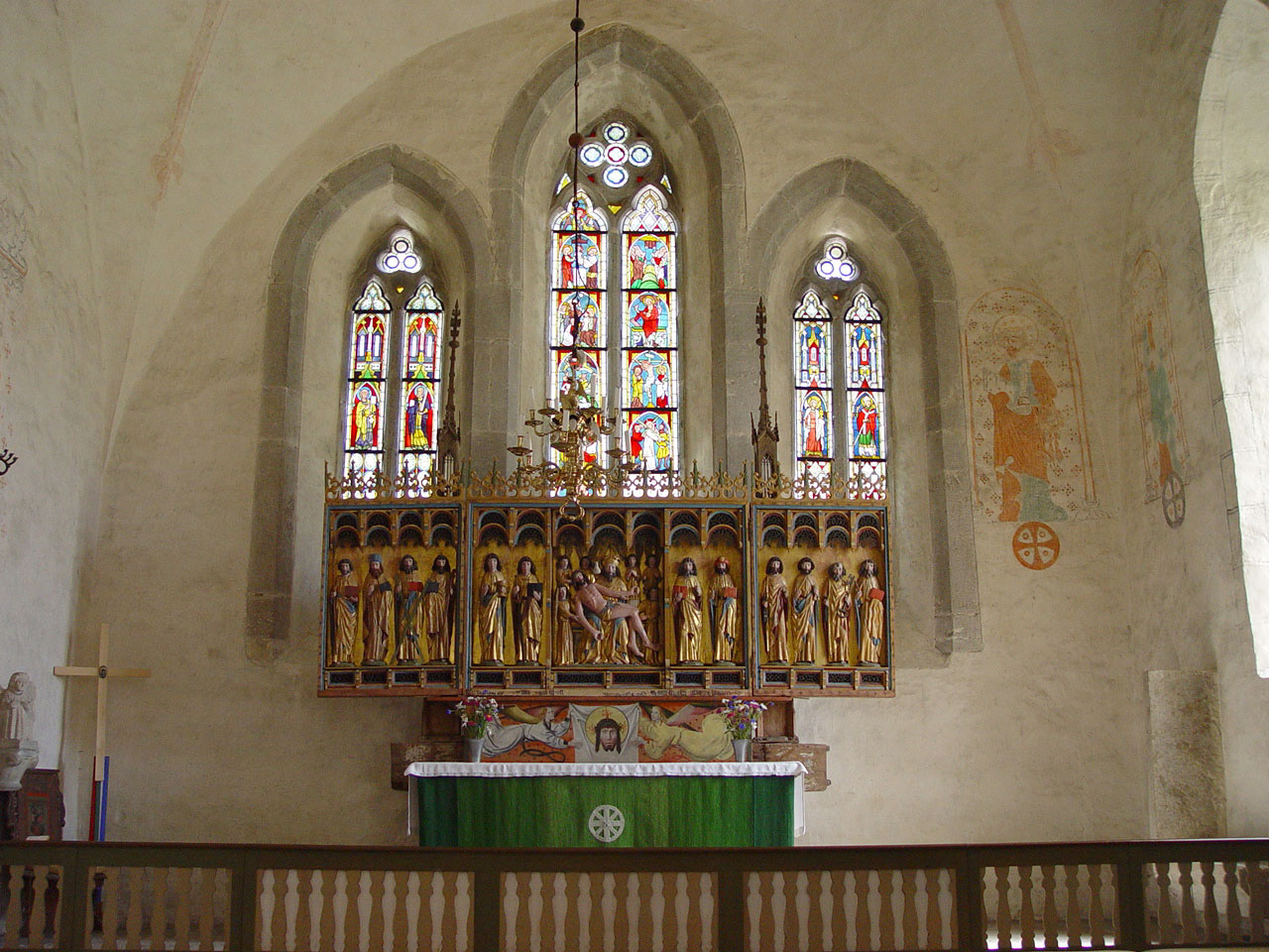 Lye kyrka auf Gotland. Altar (1496), Kalkgemälde (ca.1350), mittelalterliche Glasgemälde